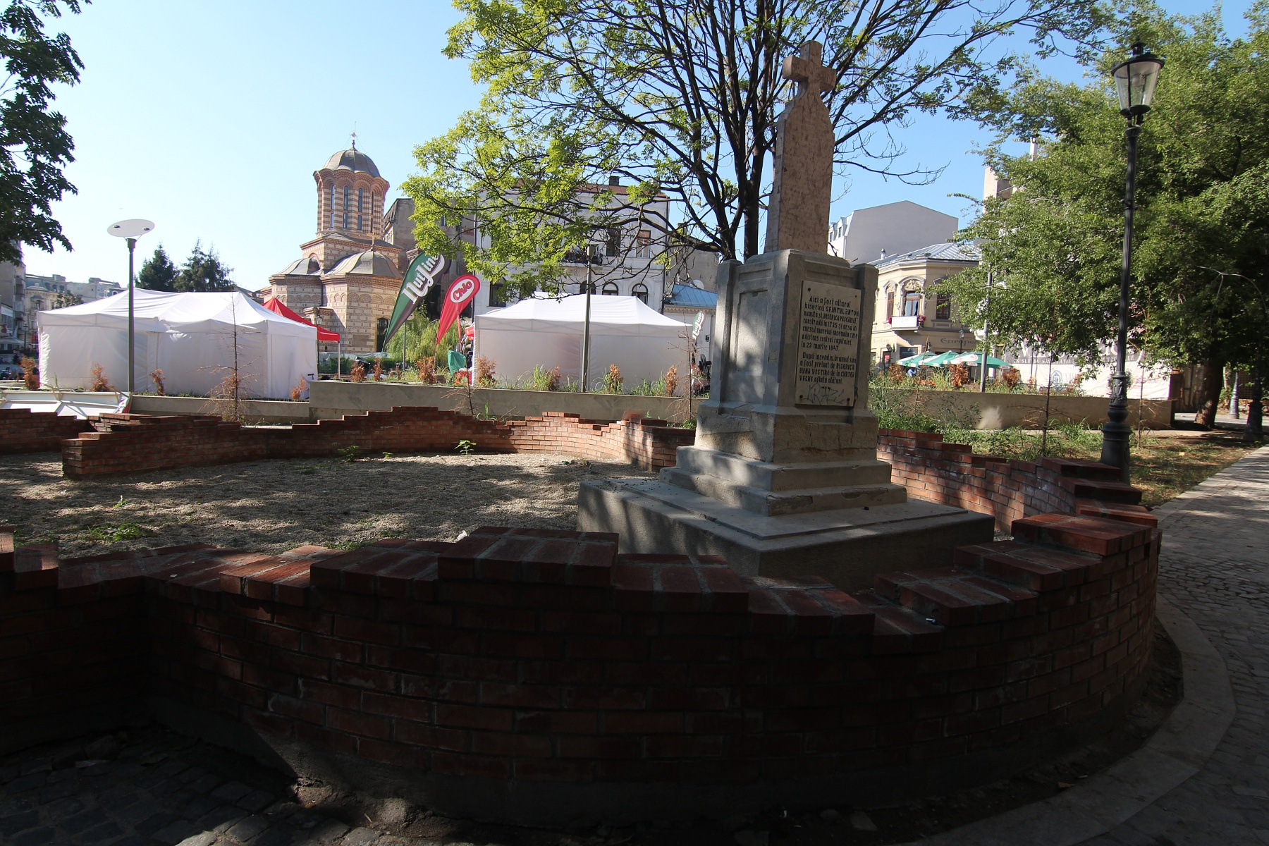 Ansamblul Bisericii Curtea Veche